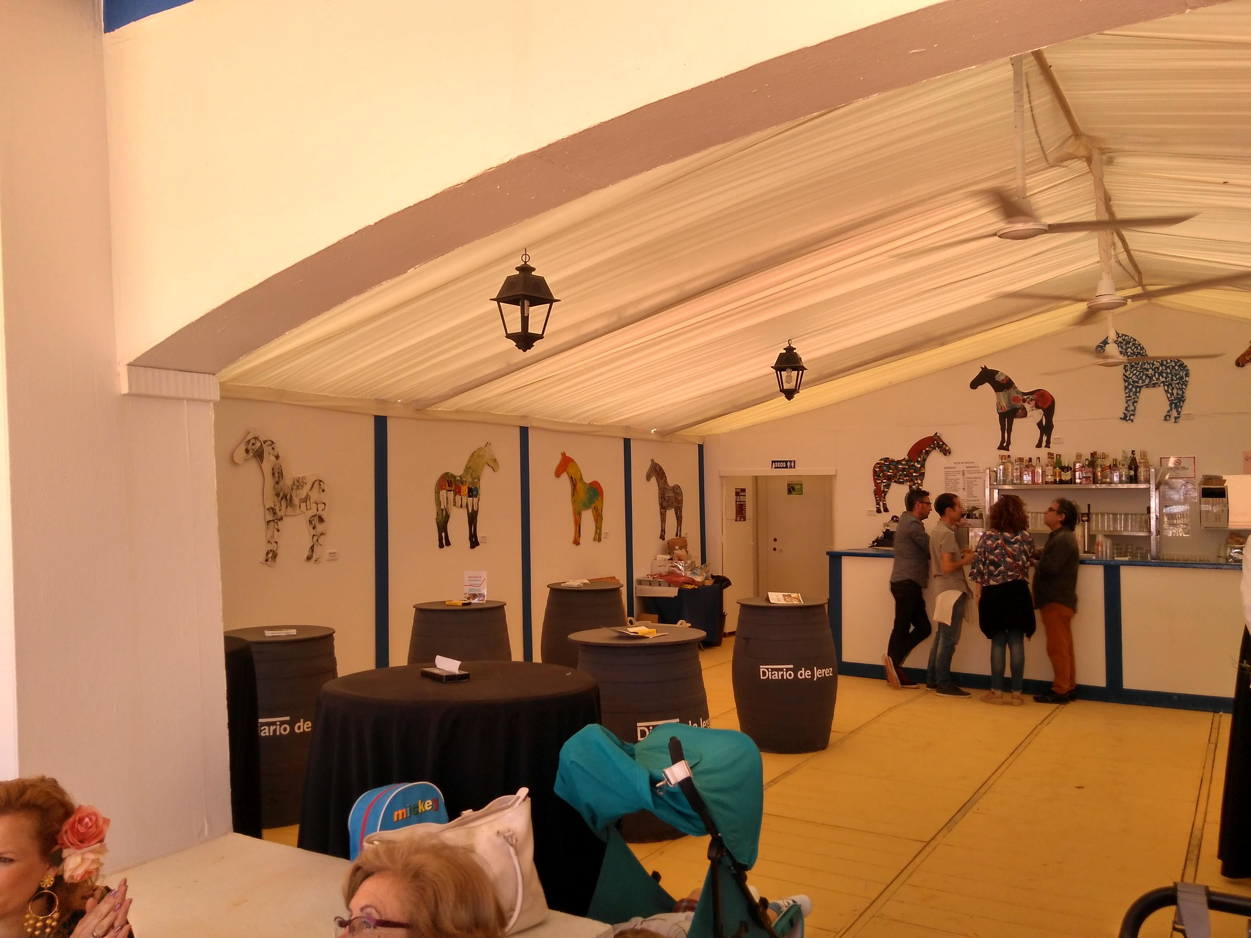 Exposición dedicada a Vicente Vela en la caseta de Diario de Jerez en la Feria del Caballo 2018, inspirada en el caballo por la capitalidad de Jerez como Ciudad Europea del Caballo.